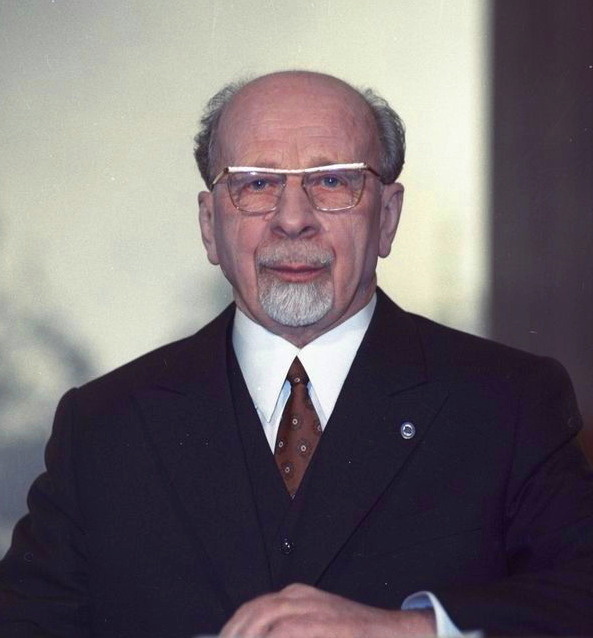 Zentralbild / Spremberg 31.12.1970 Walter Ulbricht, Vorsitzender des Staatsrates der DDR, bei seiner Neujahrsbotschaft zum Jahreswechsel 1970/71